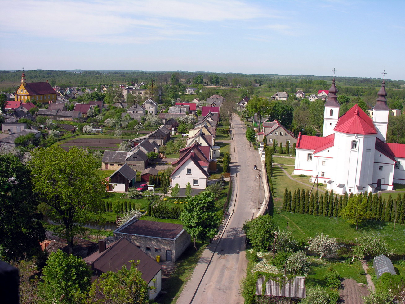 Varniai